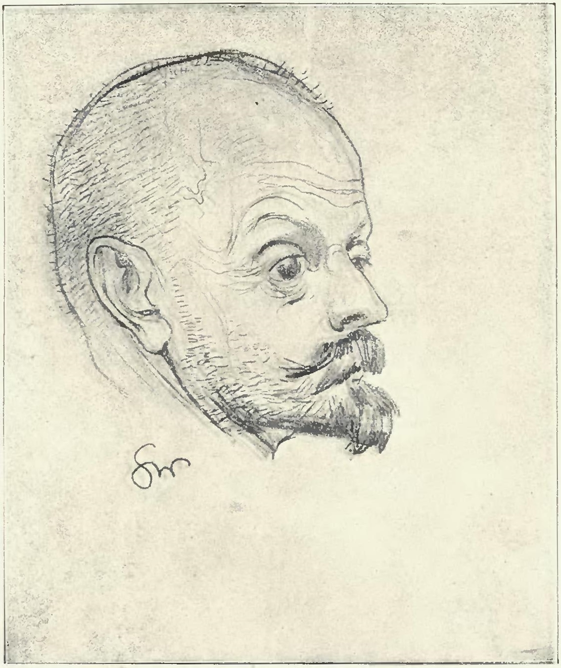 Wyspiański - Dzieła malarskie - Portret J. Malczewskiego, rys. oł.